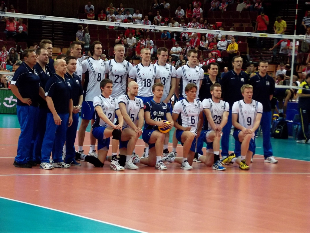 Zdjęcie zrobione podczas zawodów Ligi Światowej 2012 w katowickim Spodku.